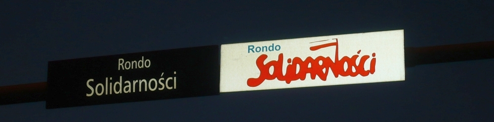 Oznakowanie Ronda Solidarności w Łodzi (które jest rondem tylko z nazwy). Fotografia nocna.